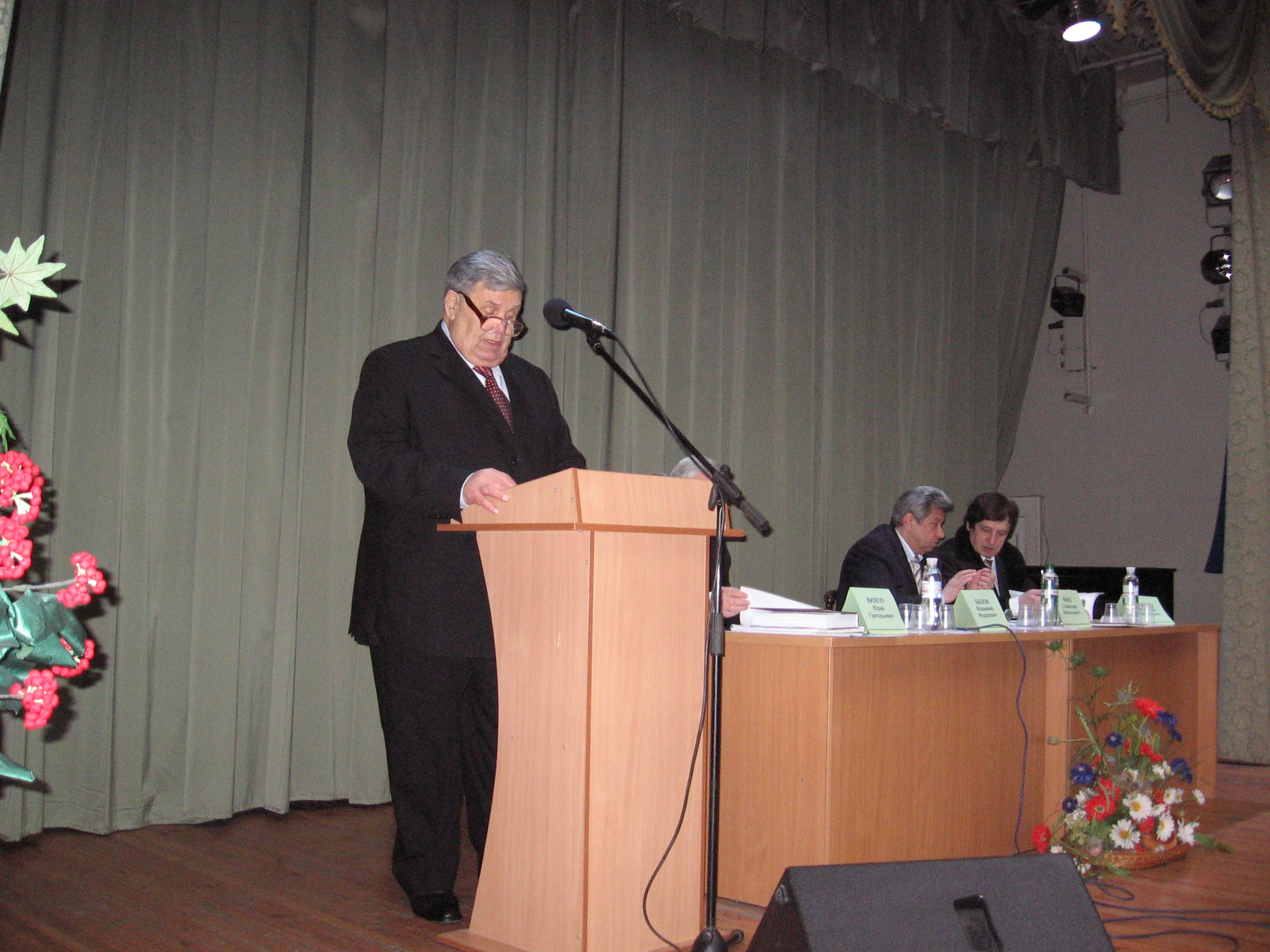 Фото